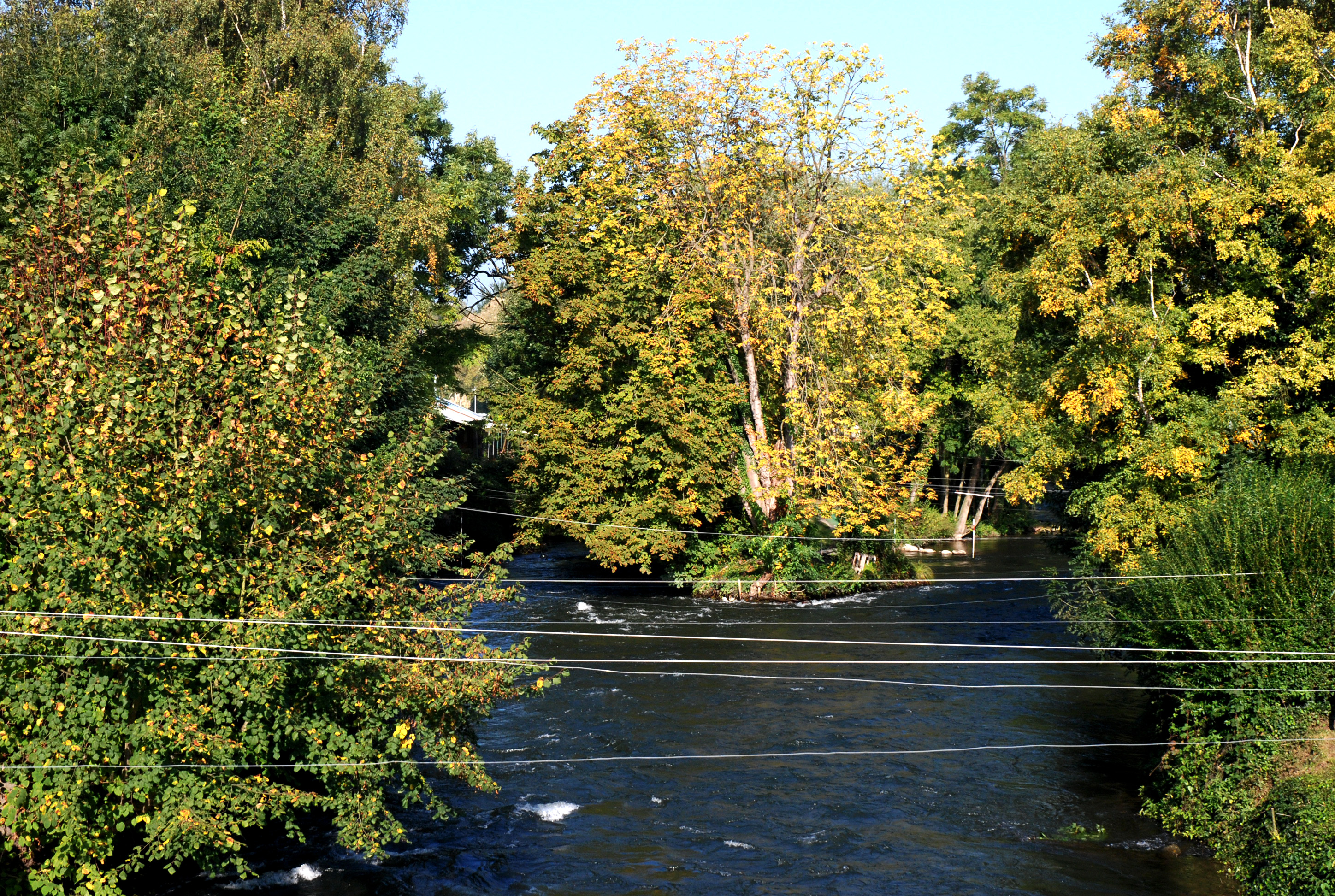 Ile de la trêve à Picquigny (France)